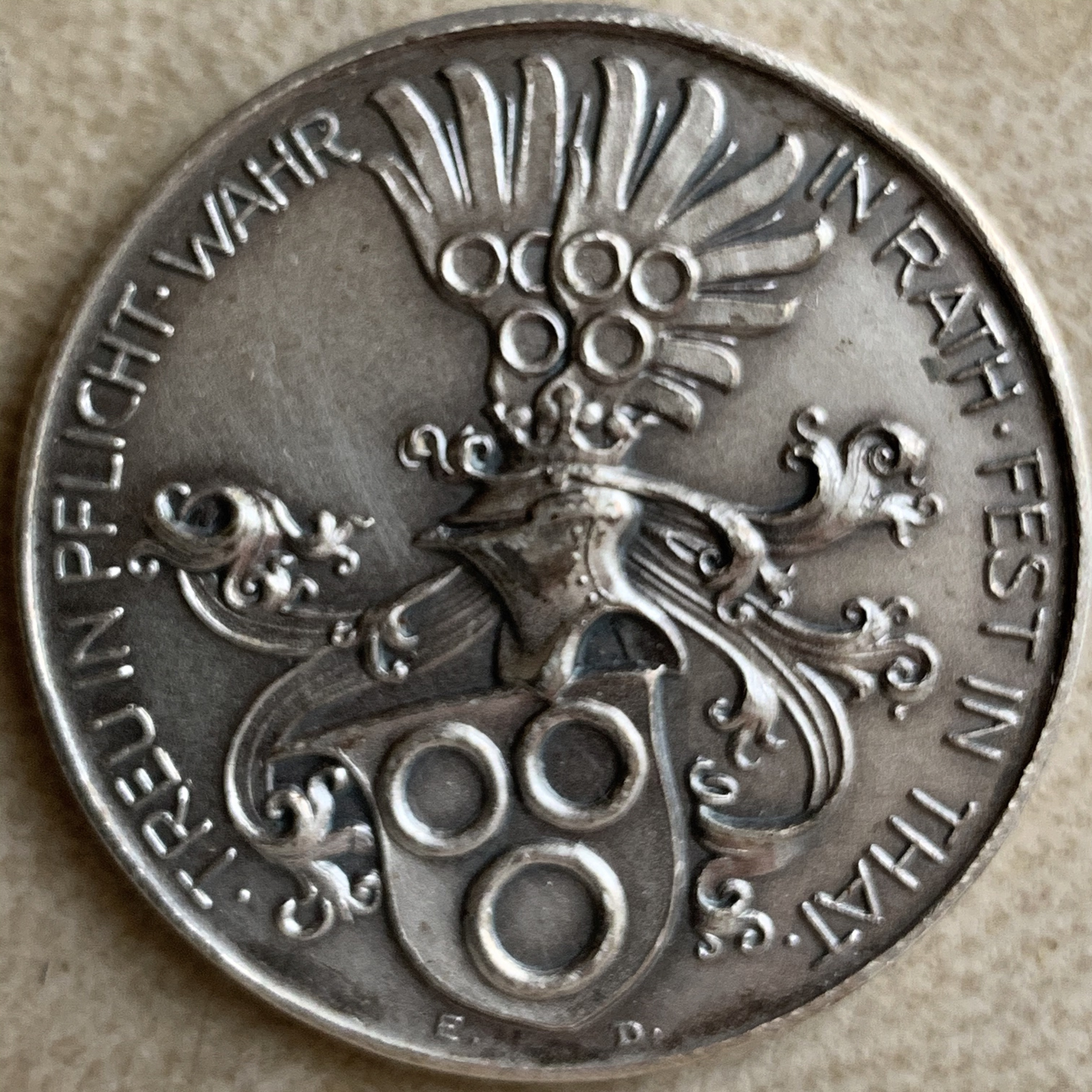 Leitspruch Silbermünze Familienstiftung 1869